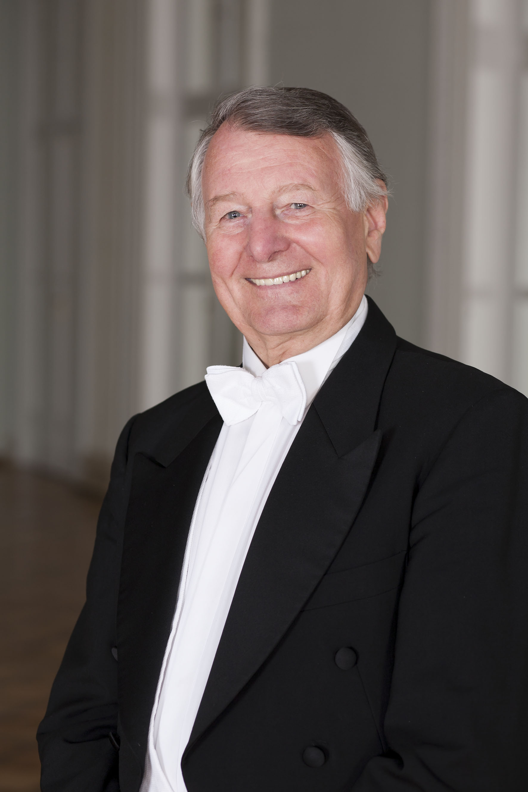 Musikalischer Leiter des Haydnorchesters Eisenstadt seit 1981.